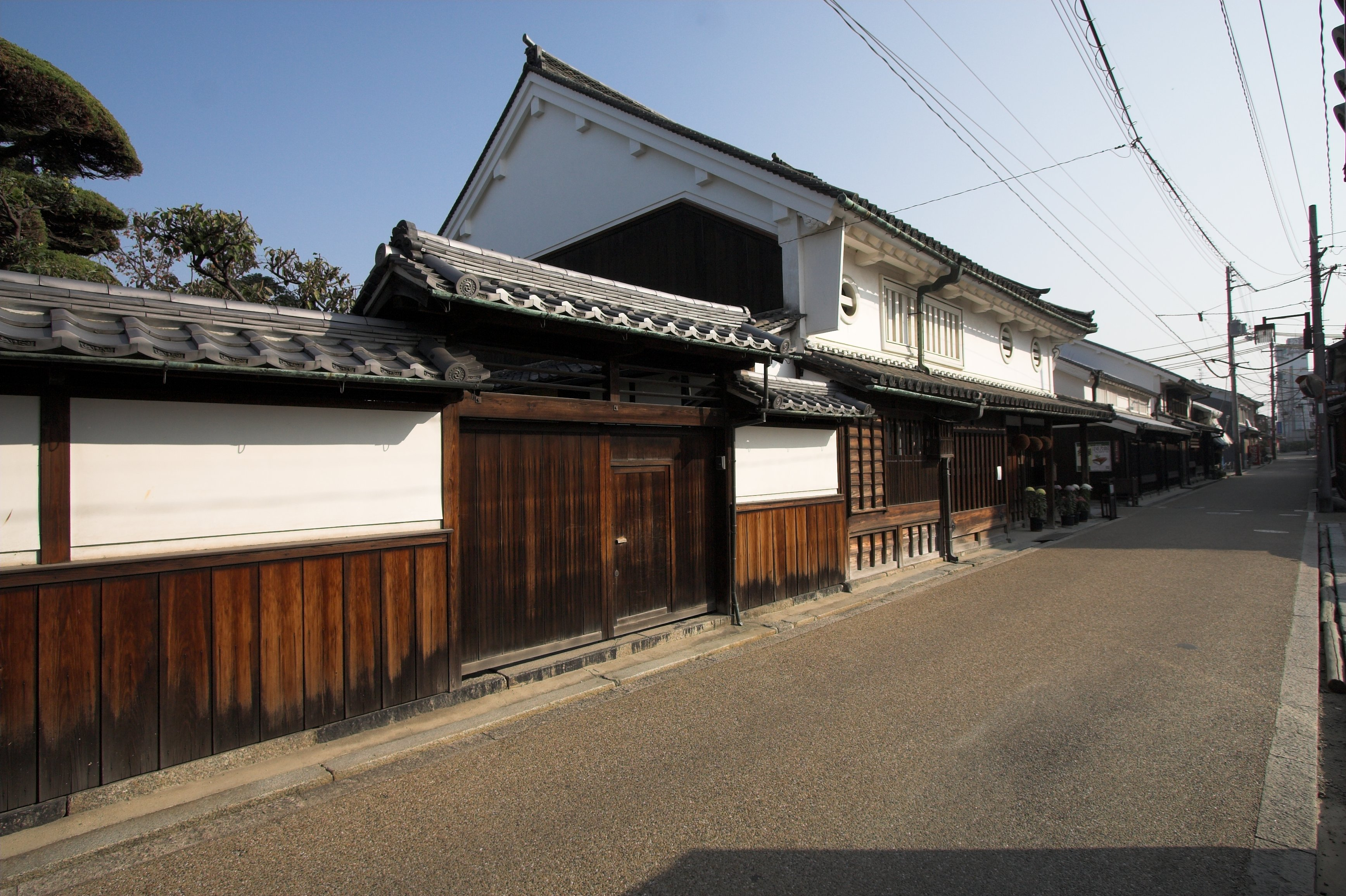 重要伝統的建造物群保存地区・今井町(奈良県橿原市, Japan)